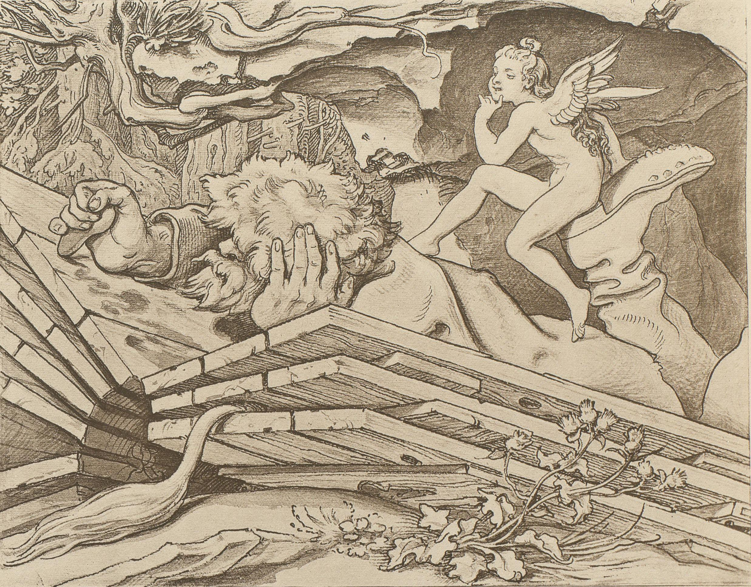 Der Sichere Mann, Sepiazeichnung von Moritz von Schwind nach Eduard Mörikes „Märchen vom sichern Mann“, 1838. – Der Götterjüngling Lolegrin sitzt auf dem Stiefelabsatz des Riesen Suckelborst, des „sicheren Mannes“, der mit Kohle sein Weltbuch aus Scheunentoren beschriftet. Vorgreifend auf eine spätere Szene klemmt bereits der Schwanz des Teufels als Lesezeichen in Suckelborsts Buch.